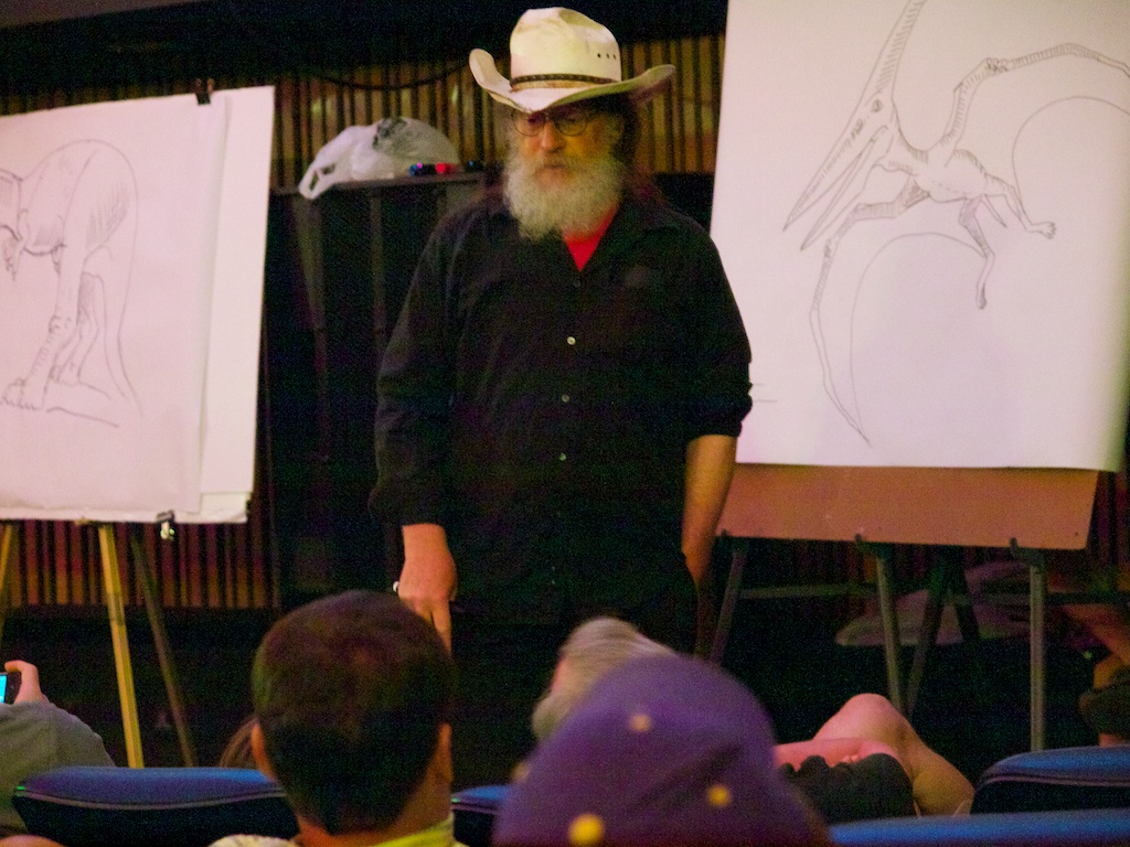 E5_P6110243